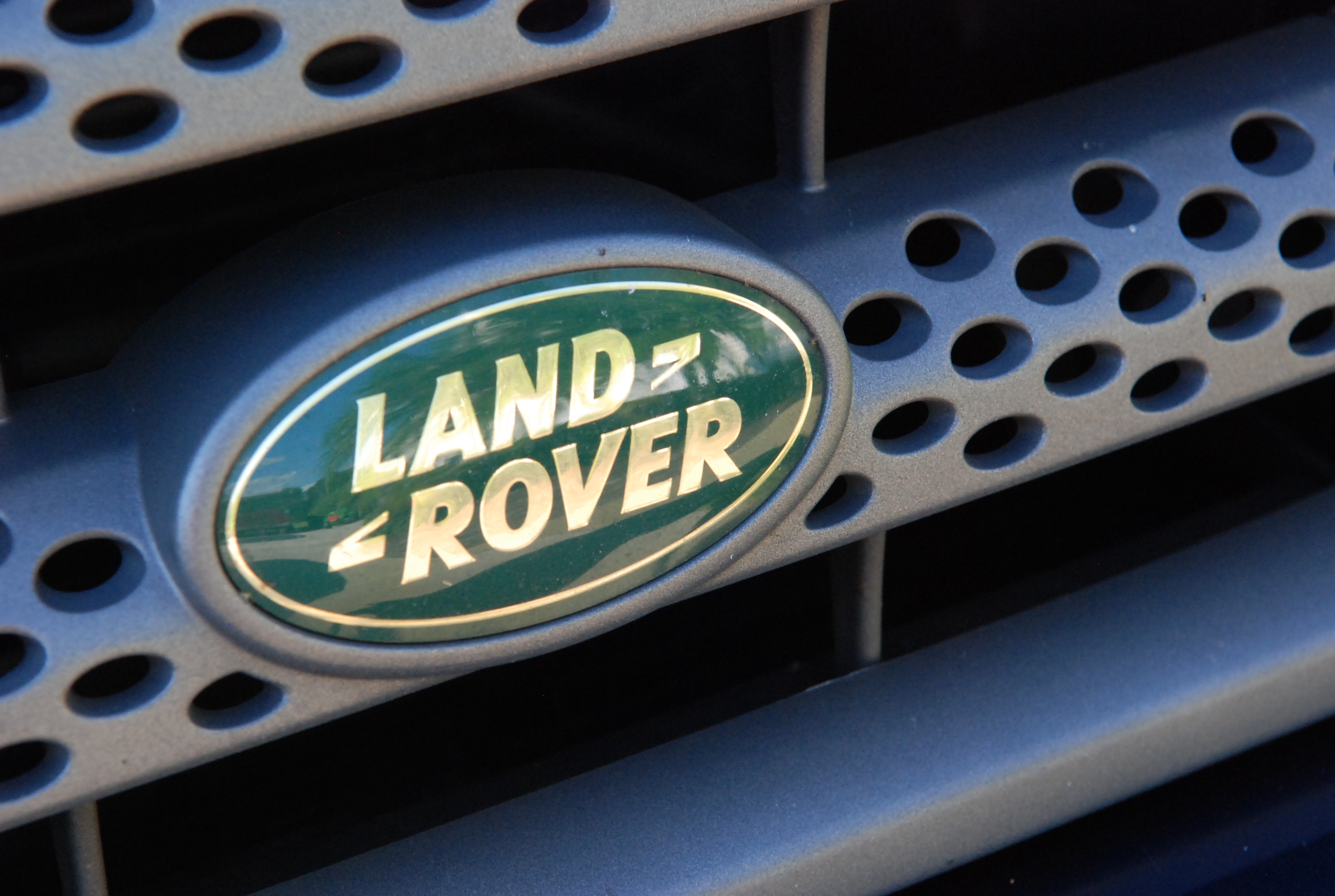 Land Rover Badge